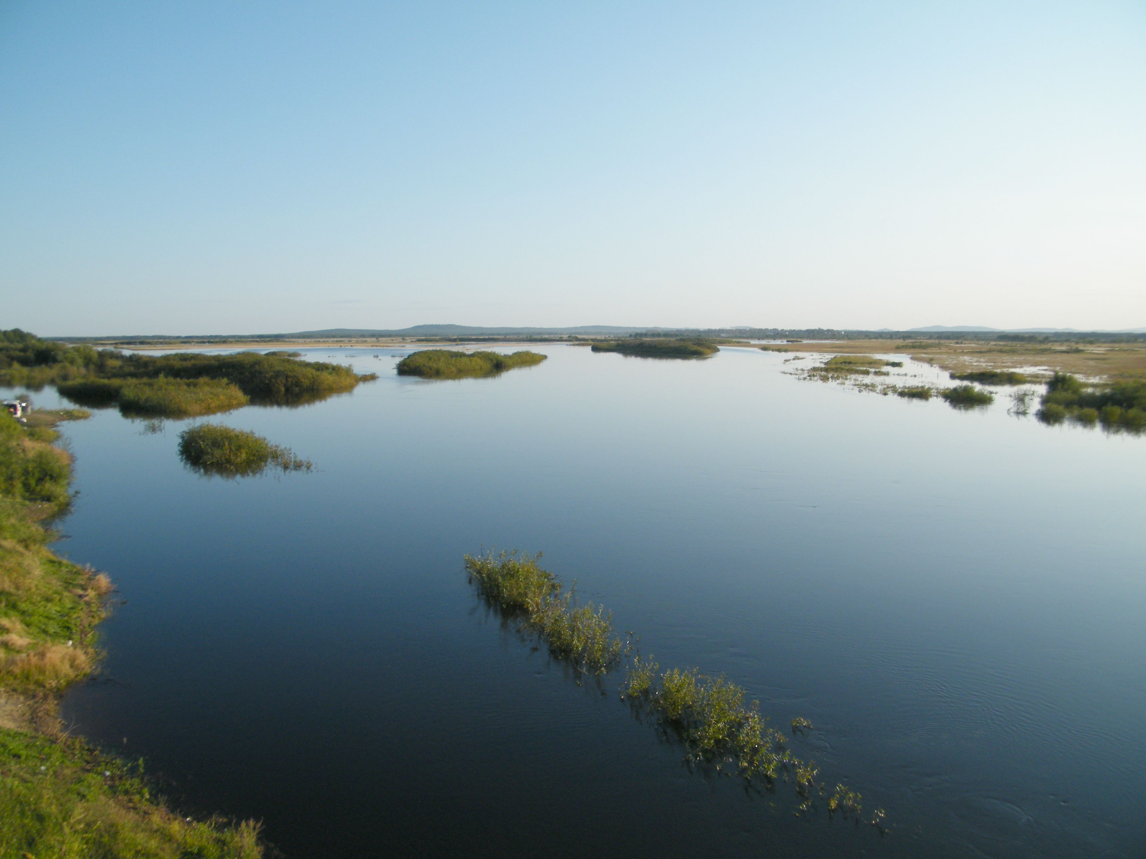 Наводнение на реке Сита